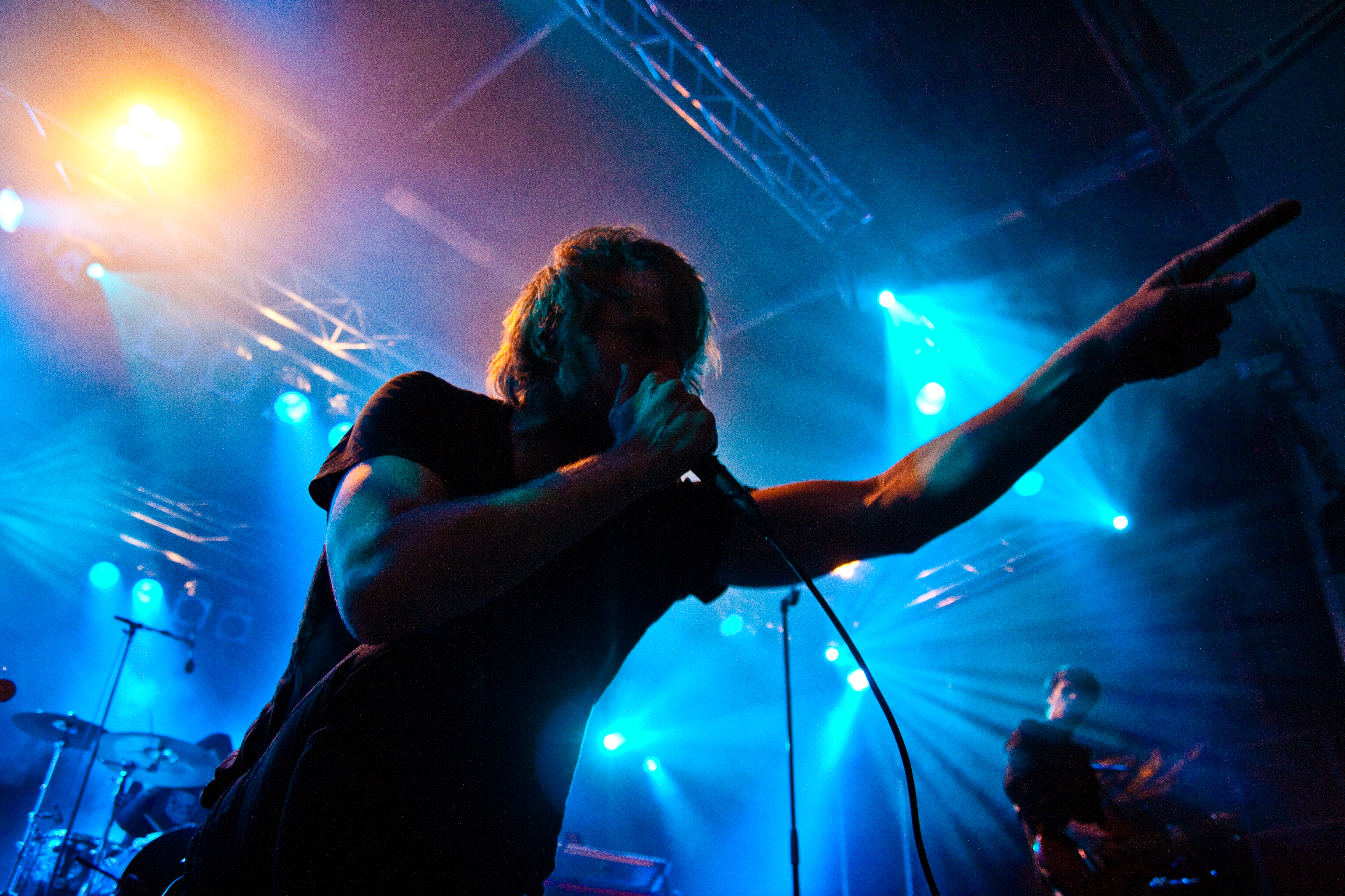 Khoma på trästockfestivalen.